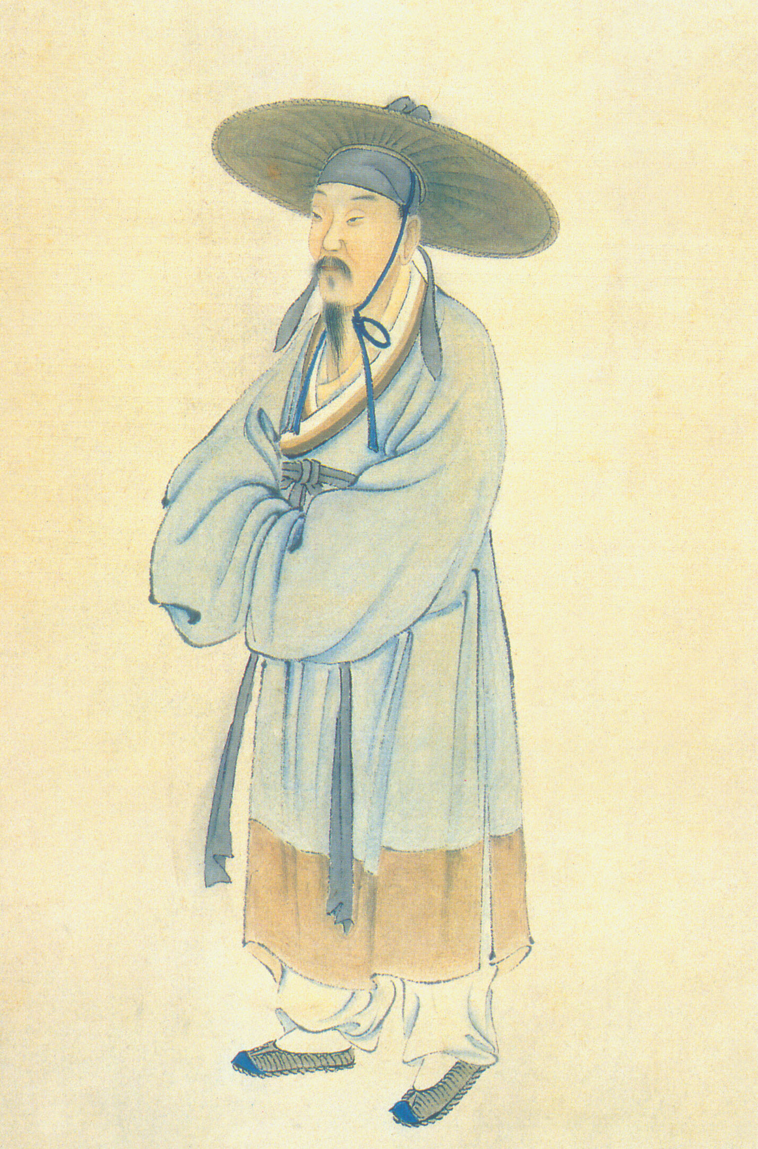 陸游 肖像